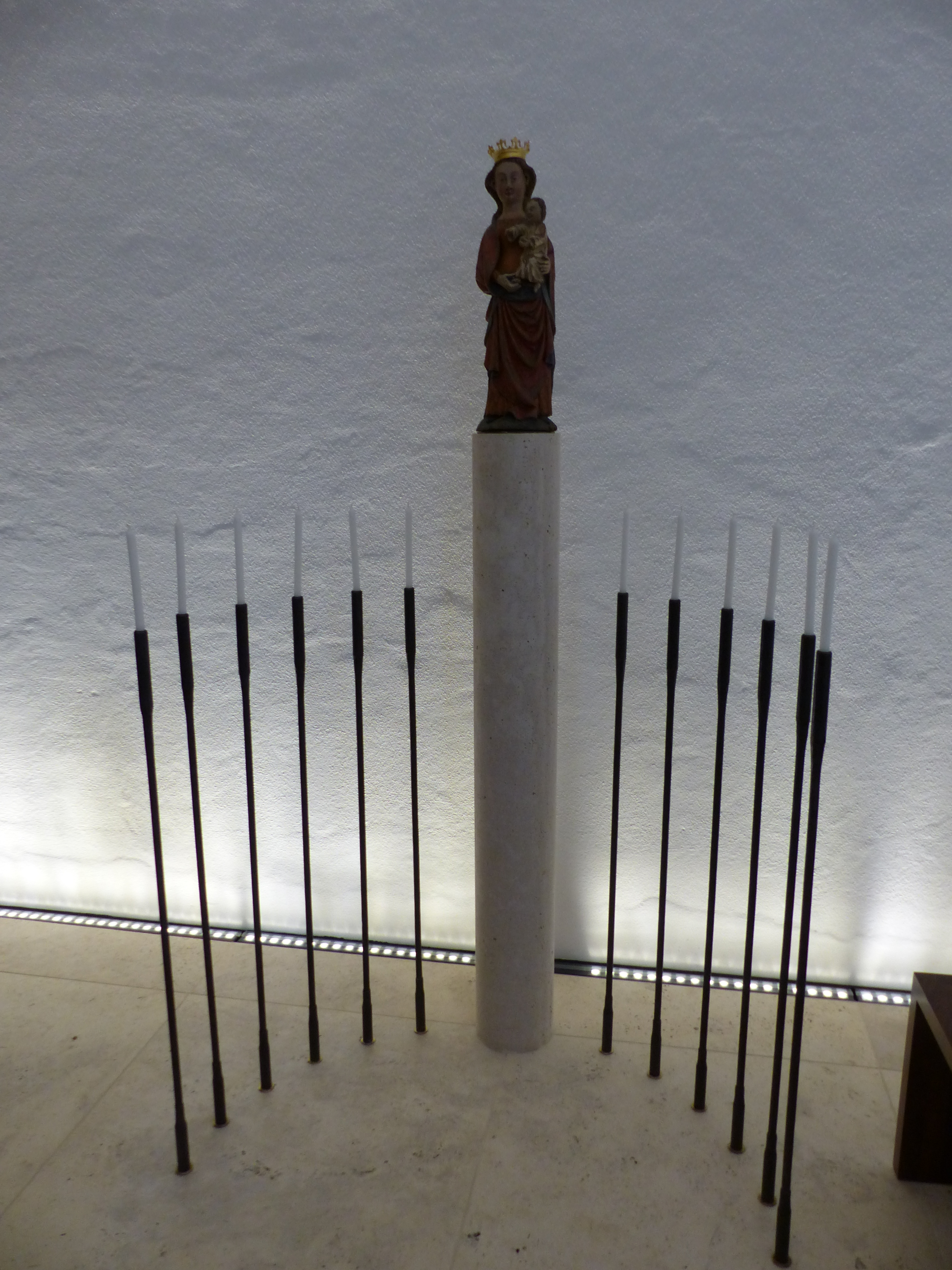 St. Maria im Limburger Bischofssitz: Statue der Patronin Maria inmitten von zwölf Leuchtern